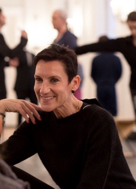 Christiane Theobald 2017